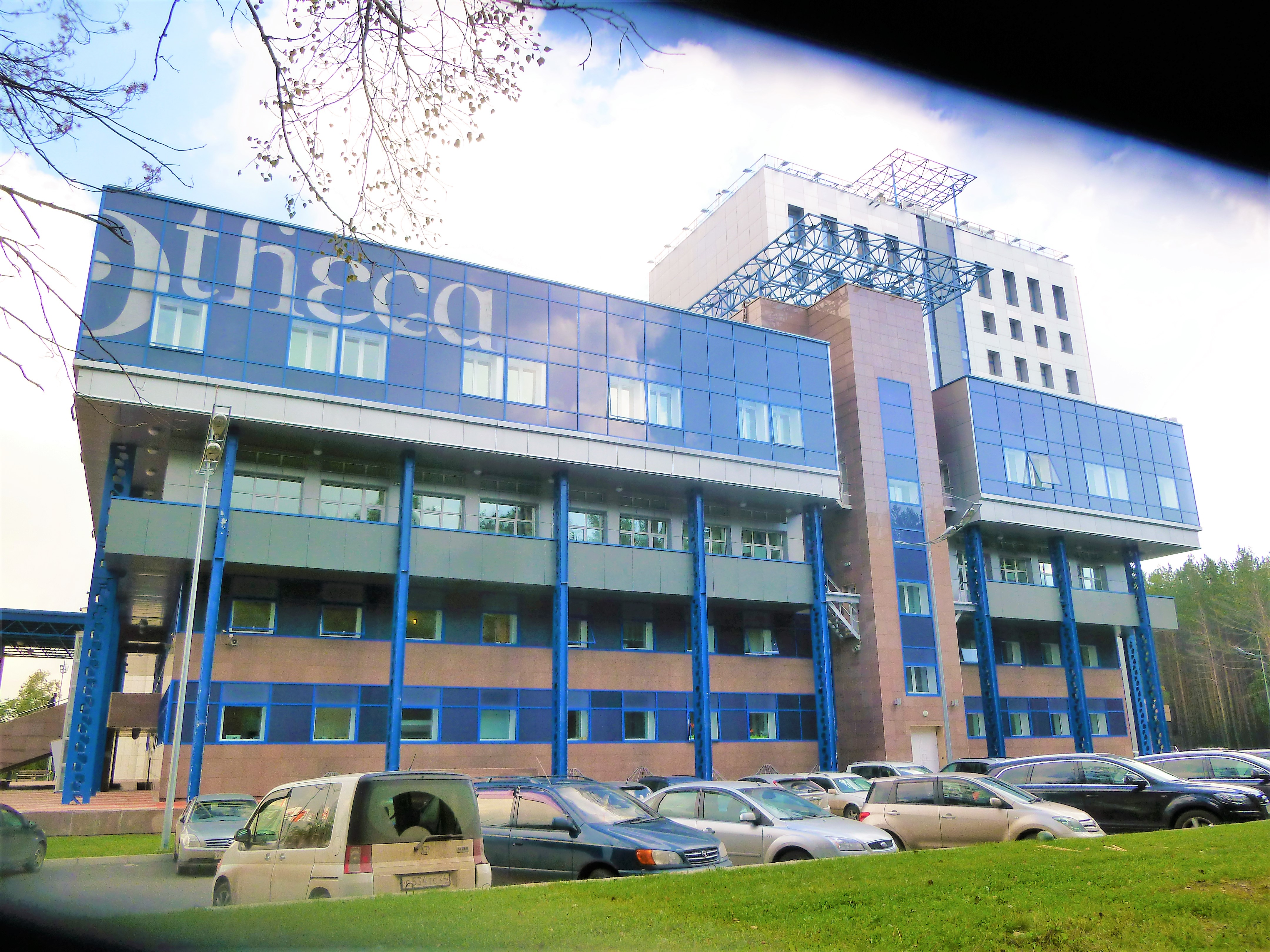 Библиотека Сибирского федерального университета